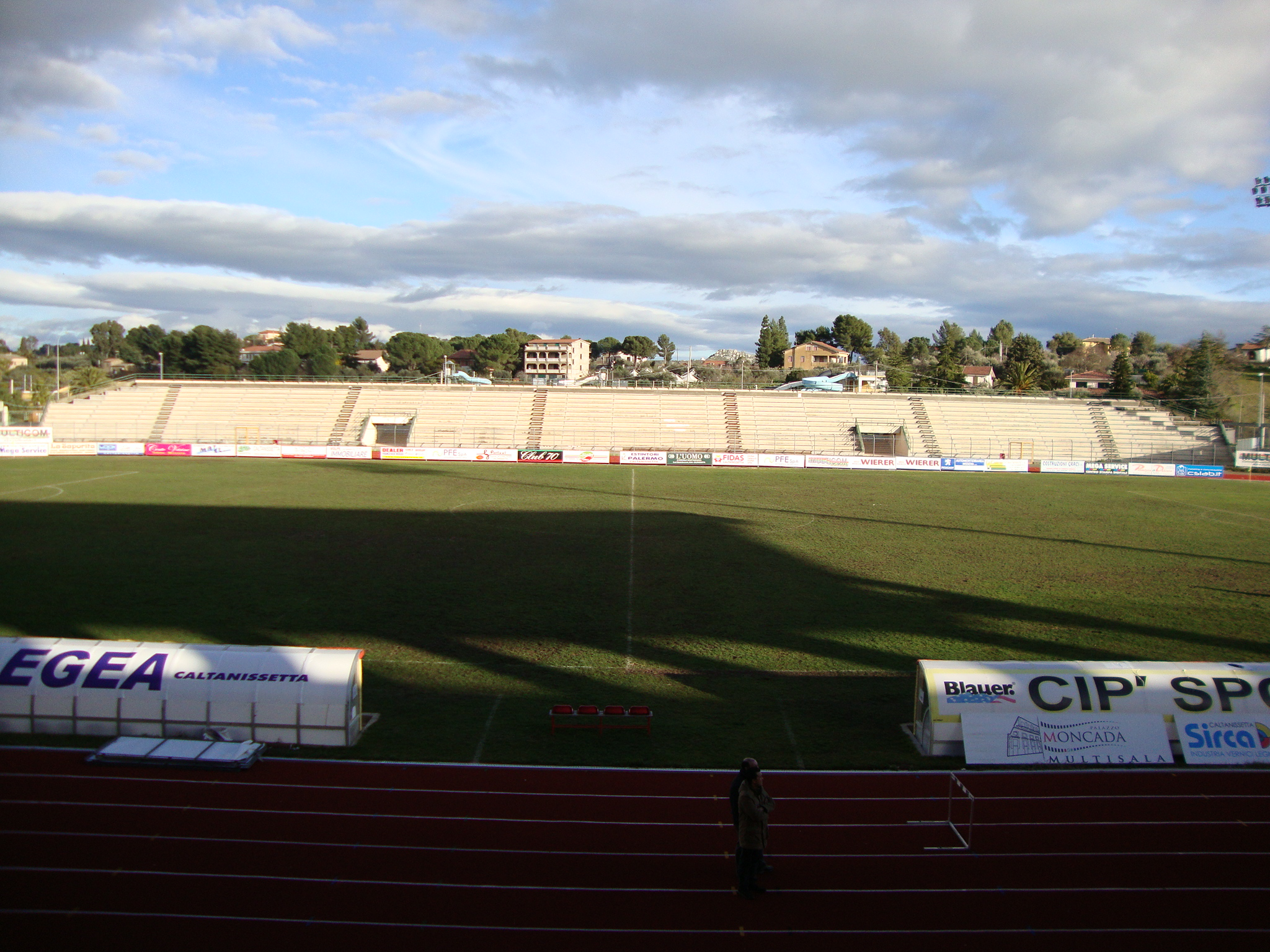 Vista panoramica dell' interno dell'impianto